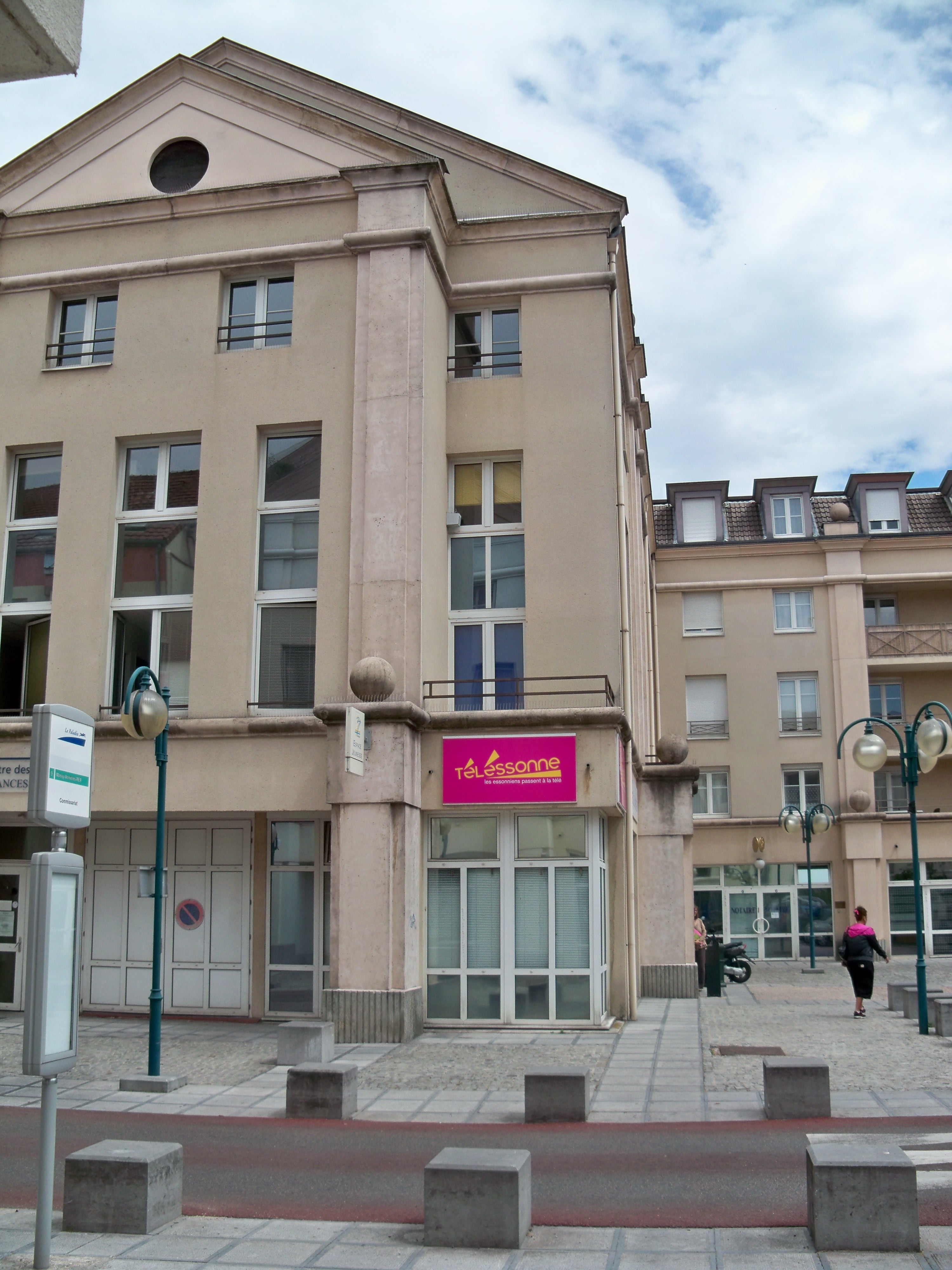 Locaux de Téléssonne, 4 place Victor Schoelcher à Massy (Essonne, France)